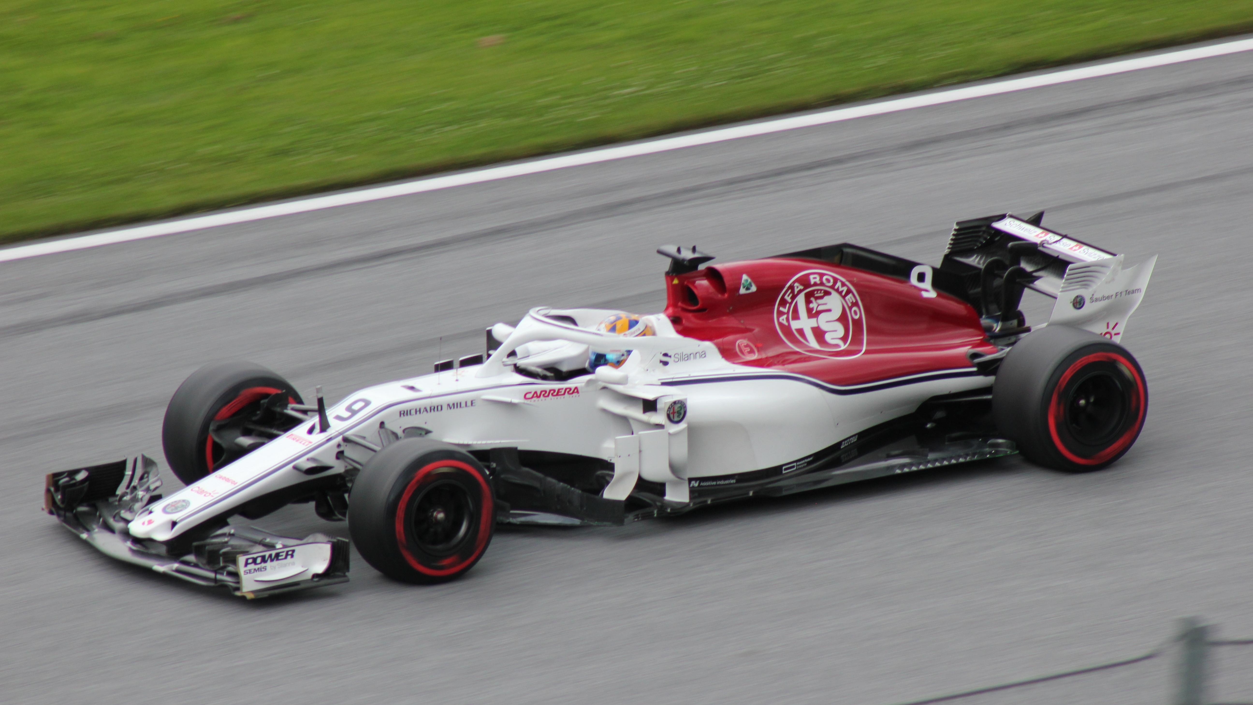 9 Ericsson beim Rennwochenende in Österreich 2018